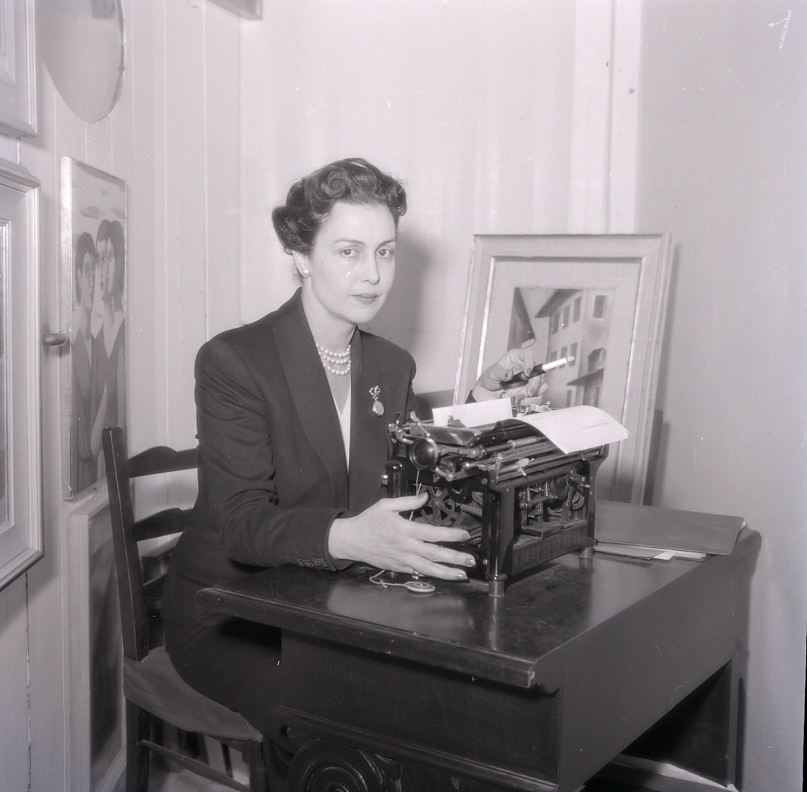 Serie fotografica : Italia, 1965 / Paolo Monti. - Buste: 9, Fototipi: 10 : Negativo b/n, gelatina bromuro d'argento/ pellicola ; 6x6. - ((Serie costituita da 10 negativi identificati con i nn.: R14240-14248. Sulla busta manoscritto: "Lidia De Stefani". La suddetta serie è contenuta nella scatola identificata con la numerazione R14207/R14356. Sul coperchio della scatola, manoscritto a pennarello: "Ritratti".